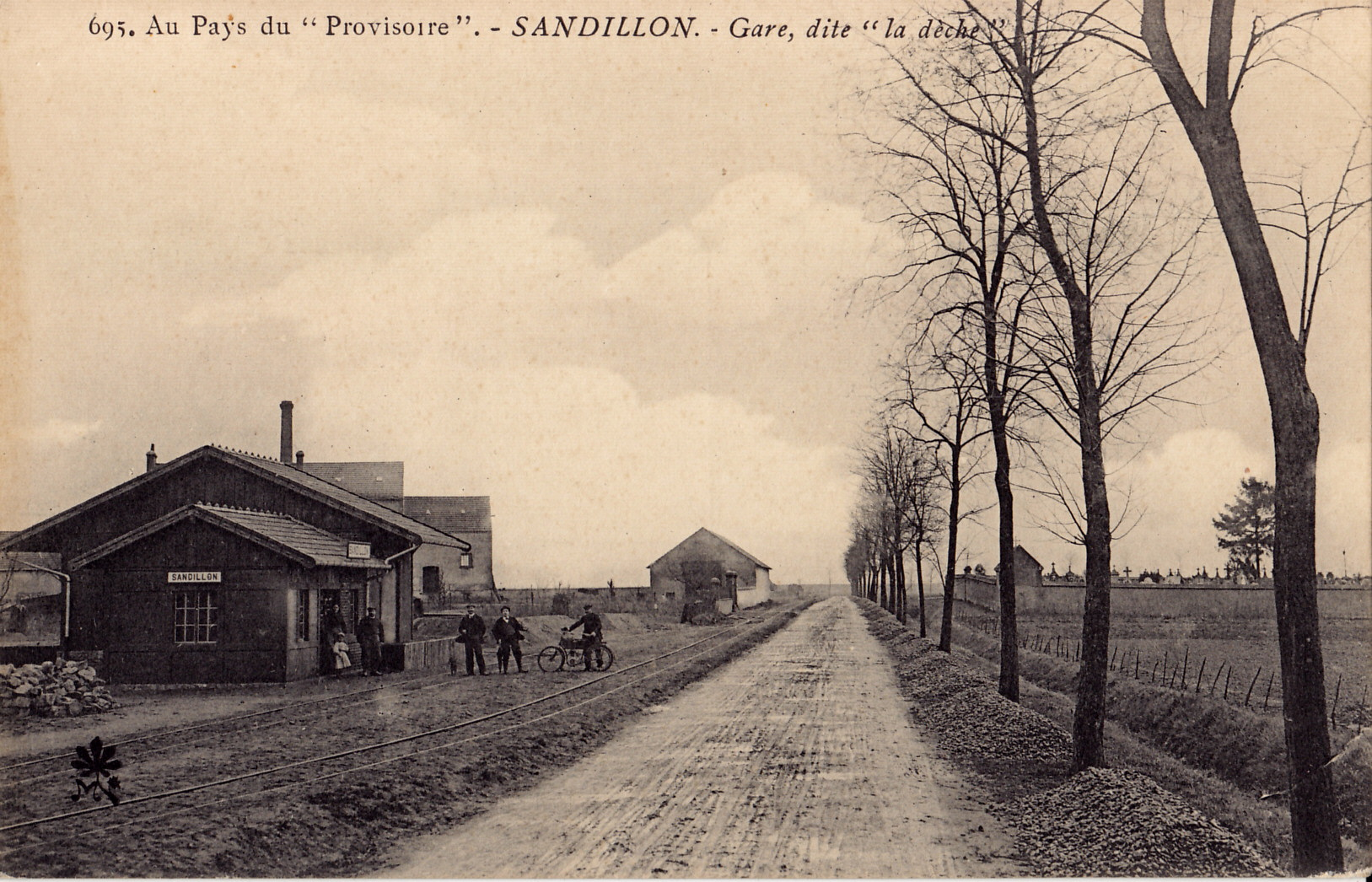 Carte postale ancienne éditée par un éditeur au logo M + feuille :Au Pays du Provisoire - SANDILLON - Gare, dite "la dèche"